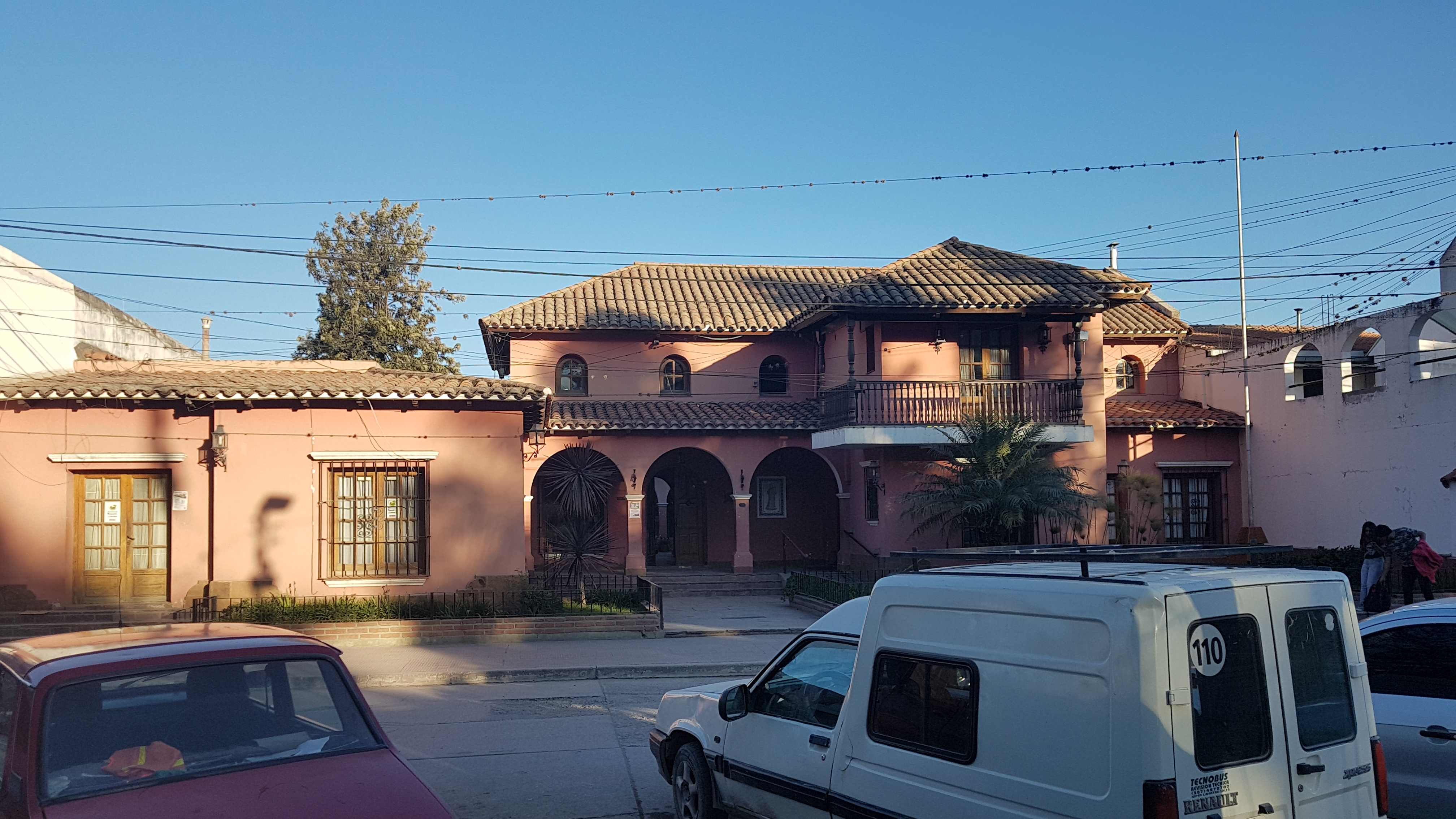 La imagen muestra la fachada de la municipalidad de Rosario de Lerma, es una localidad del noroeste de Argentina, en la Provincia de Salta. Es cabecera del departamento homónimo, y se encuentra a 33 km de la Ciudad de Salta, capital de la provincia. Se encuentra ubicada frente a la plaza principal Victorino de la Plaza.fachada de edificio